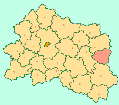 Orel Oblast map by Al Silonov Карта районов Орловской области